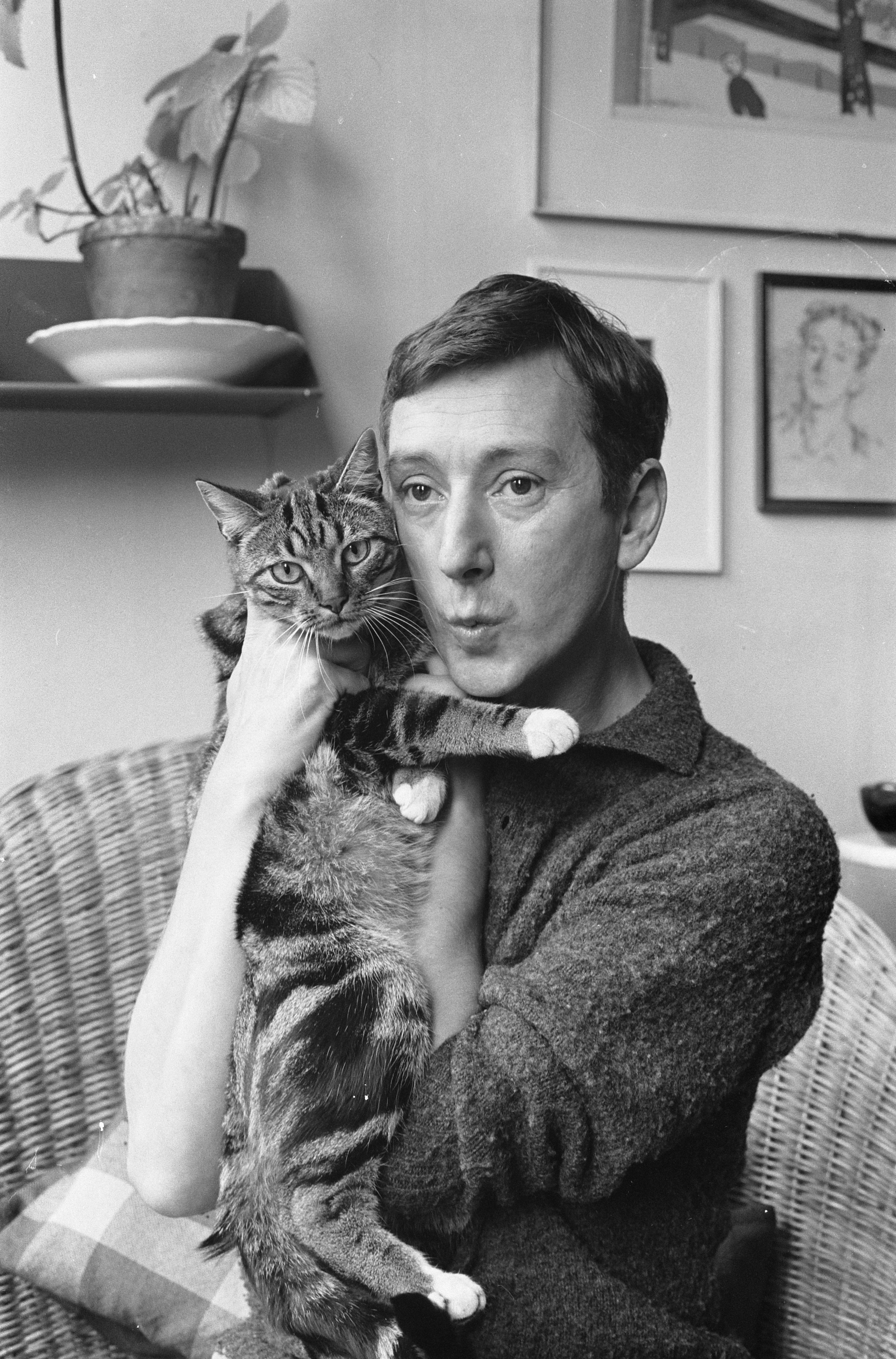 Collectie / Archief : Fotocollectie Anefo Reportage / Serie : [ onbekend ] Beschrijving : Albert Mol Annotatie : Opdracht Telegraaf Datum : 17 juli 1962 Trefwoorden : katten, portretten Persoonsnaam : Mol, Albert Instellingsnaam : Telegraaf Fotograaf : Pot, Harry / Anefo Auteursrechthebbende : Nationaal Archief Materiaalsoort : Negatief (zwart/wit) Nummer archiefinventaris : bekijk toegang 2.24.01.05 Bestanddeelnummer : 914-1349